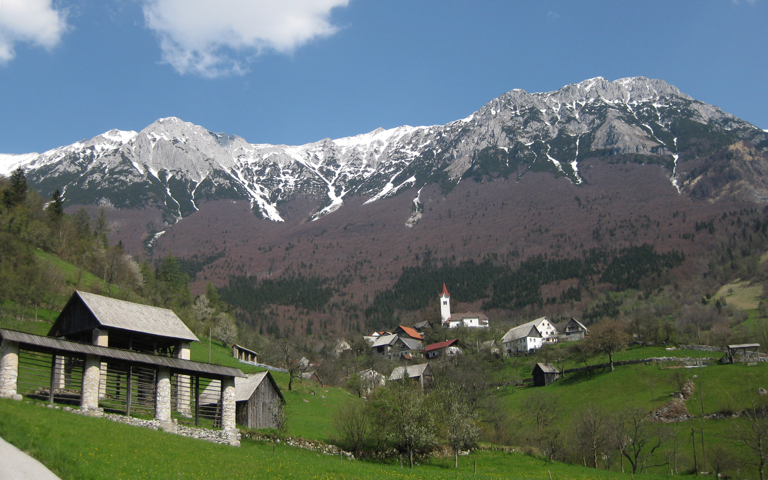 Rut, village in Slovenia